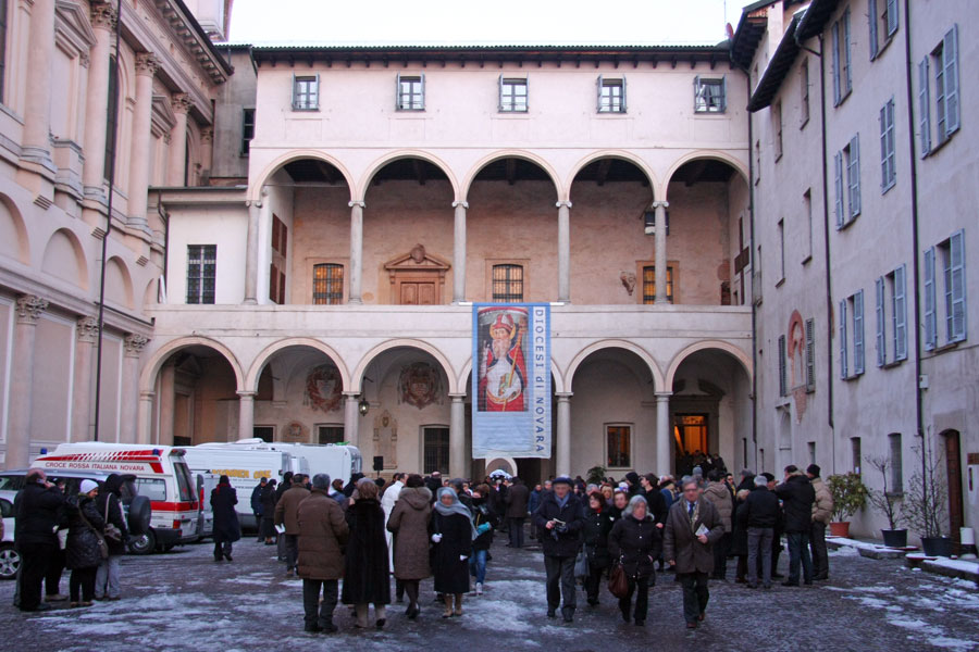 Il palazzo della Canonica di Novara nel giorno dell'insediamento del Vescovo Brambilla (5 febbraio 2012)